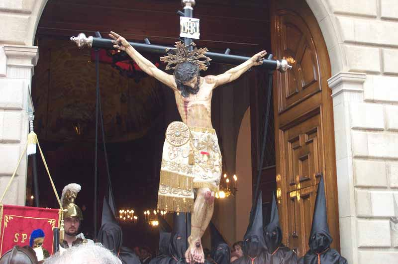 El Cristo de la Purísima Sangre en Las Tres Gracias, Reus (Spain)